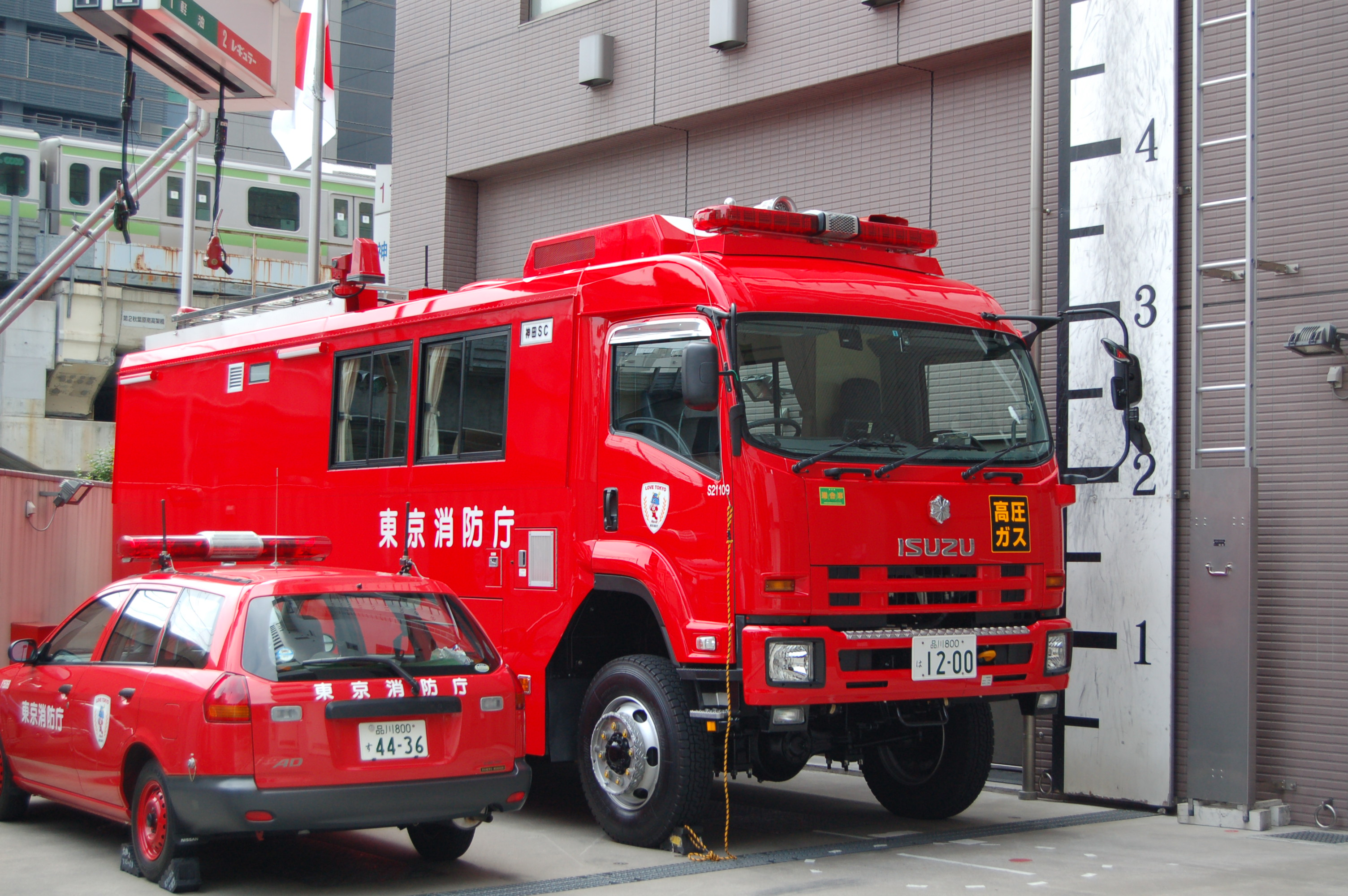 東京消防庁神田消防署神田SC1